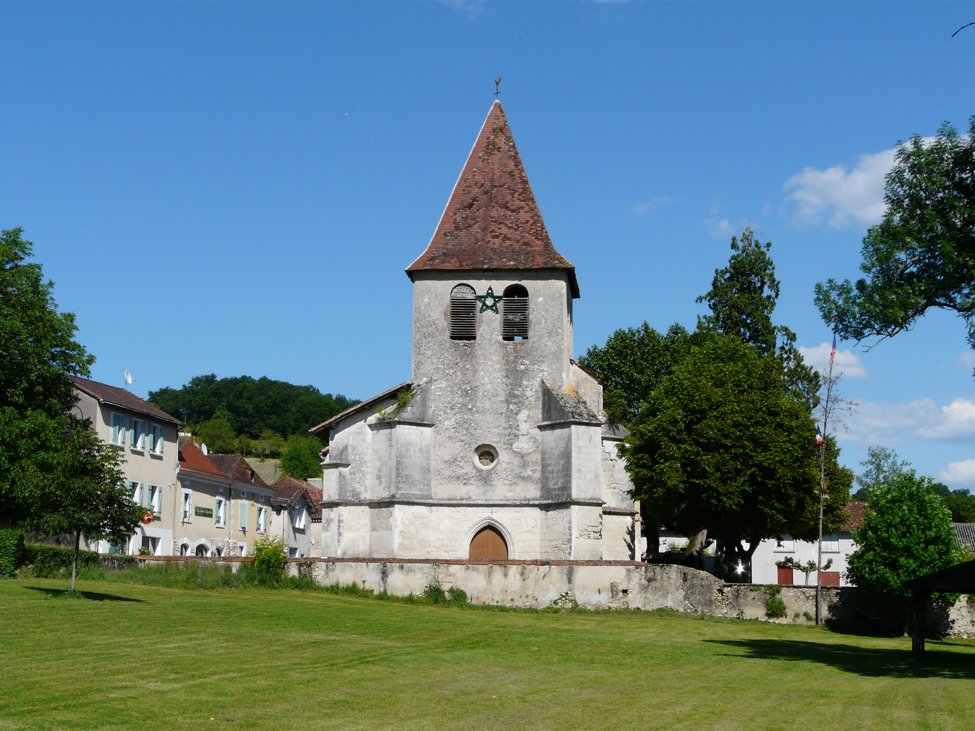 L'église Saint-Eutrope, Saint-Aquilin, Dordogne, France Object location45° 11′ 08.1″ N, 0° 29′ 32.6″ E